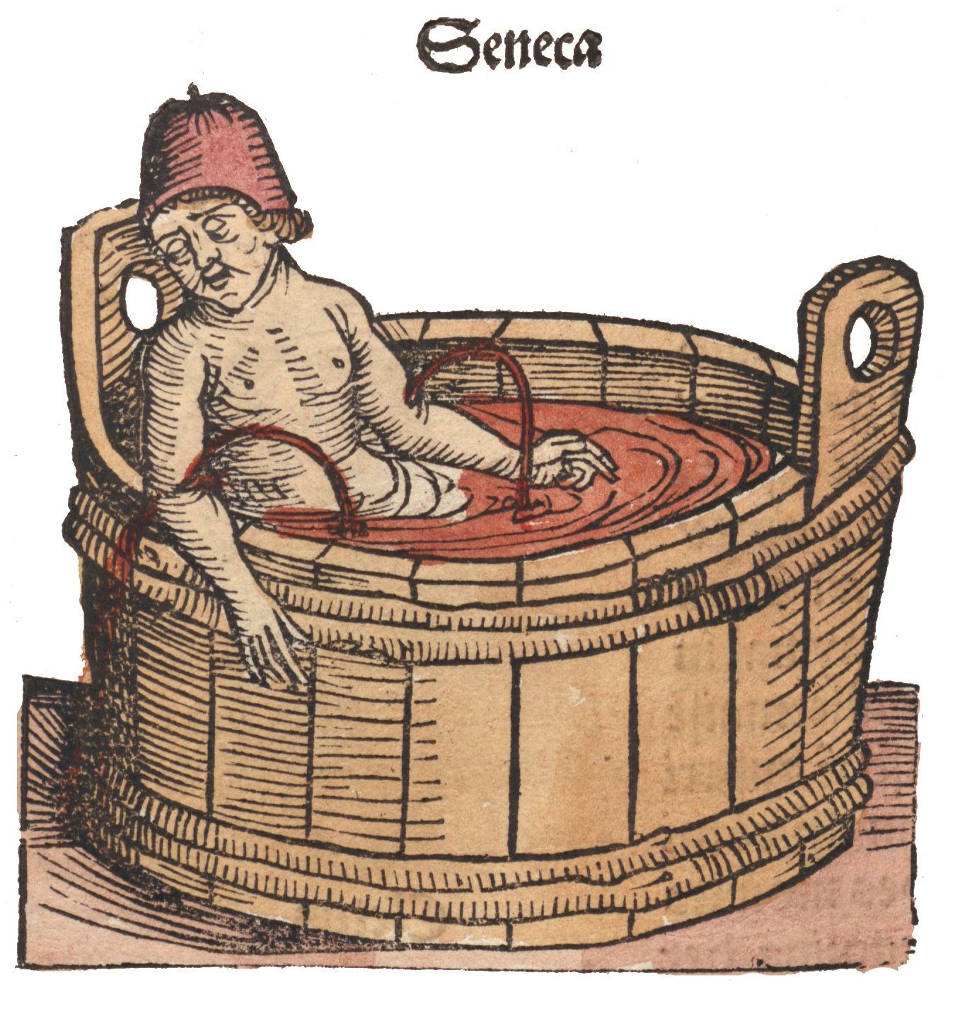 Senecas Tod